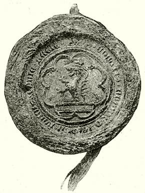 Szécsényi Frank országbíró pecsétje